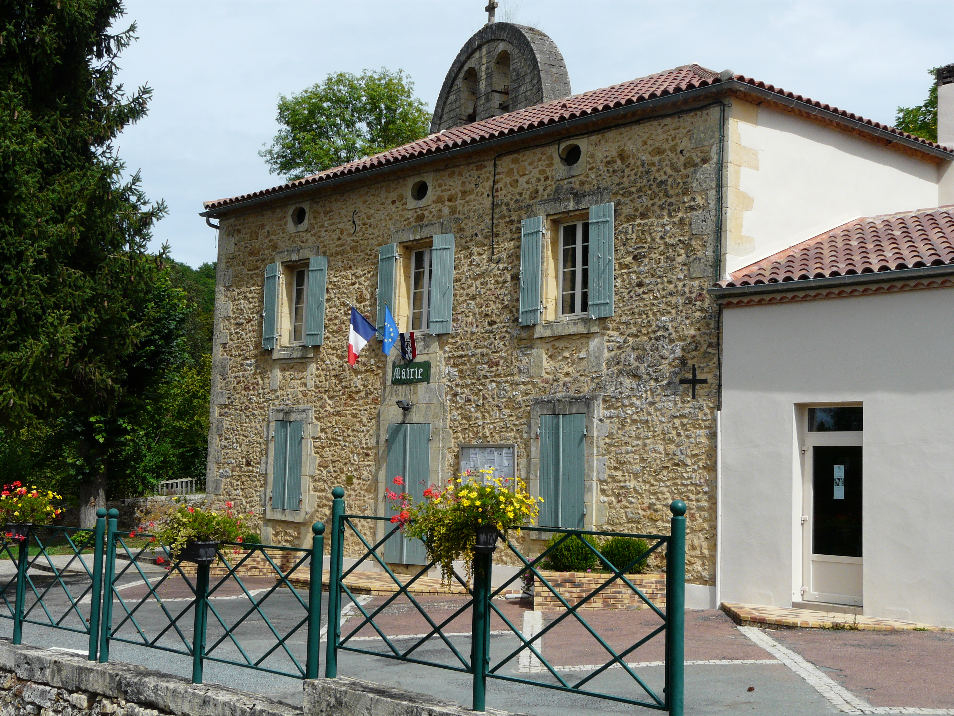 Mairie de Bayac, Dordogne, France.